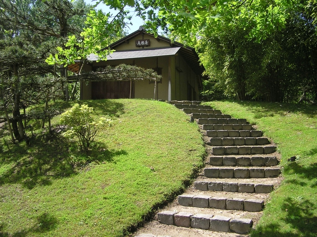 foto Mike, 22 mei 2005